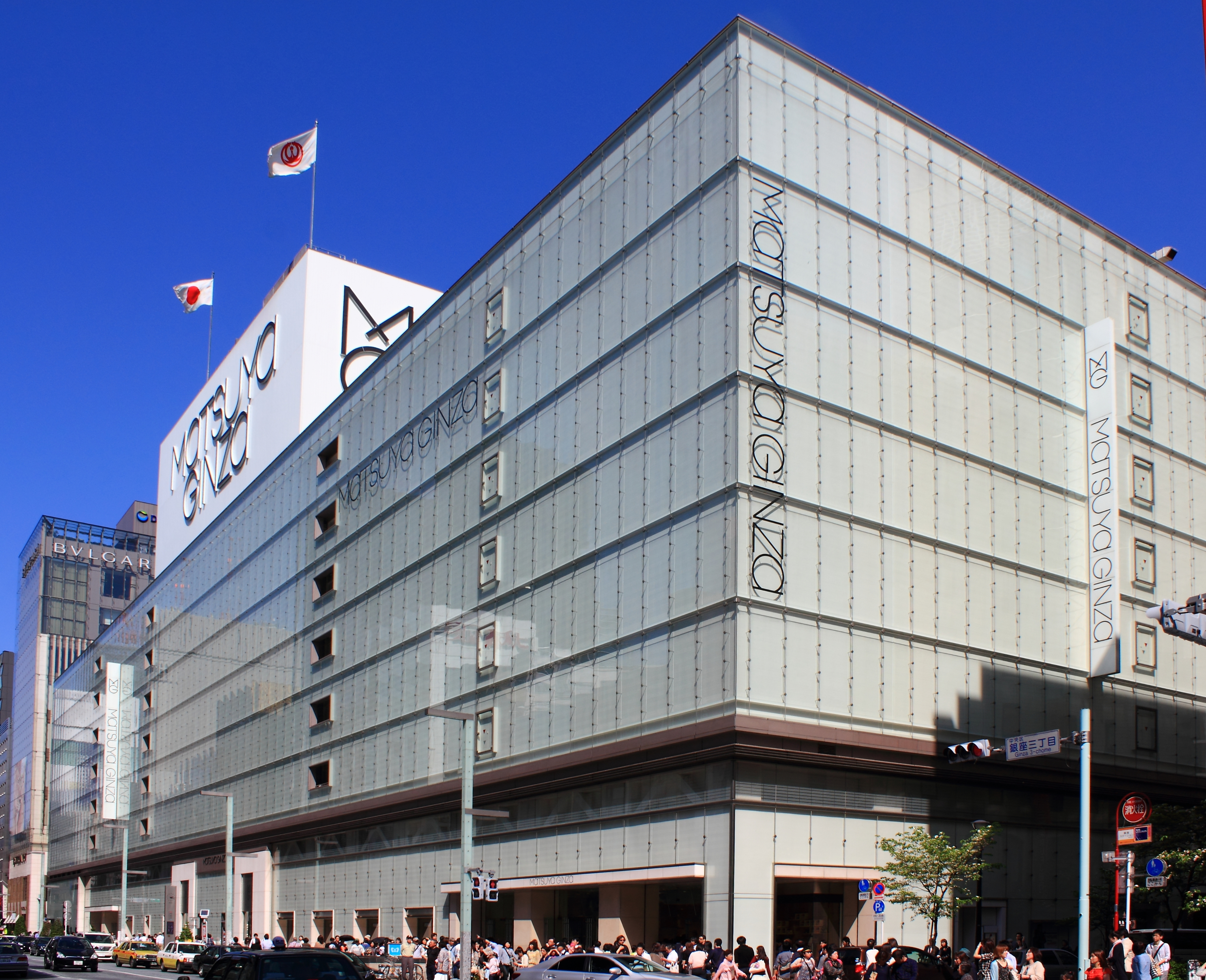 松屋銀座店（東京都中央区銀座）、Matsuya Ginza.